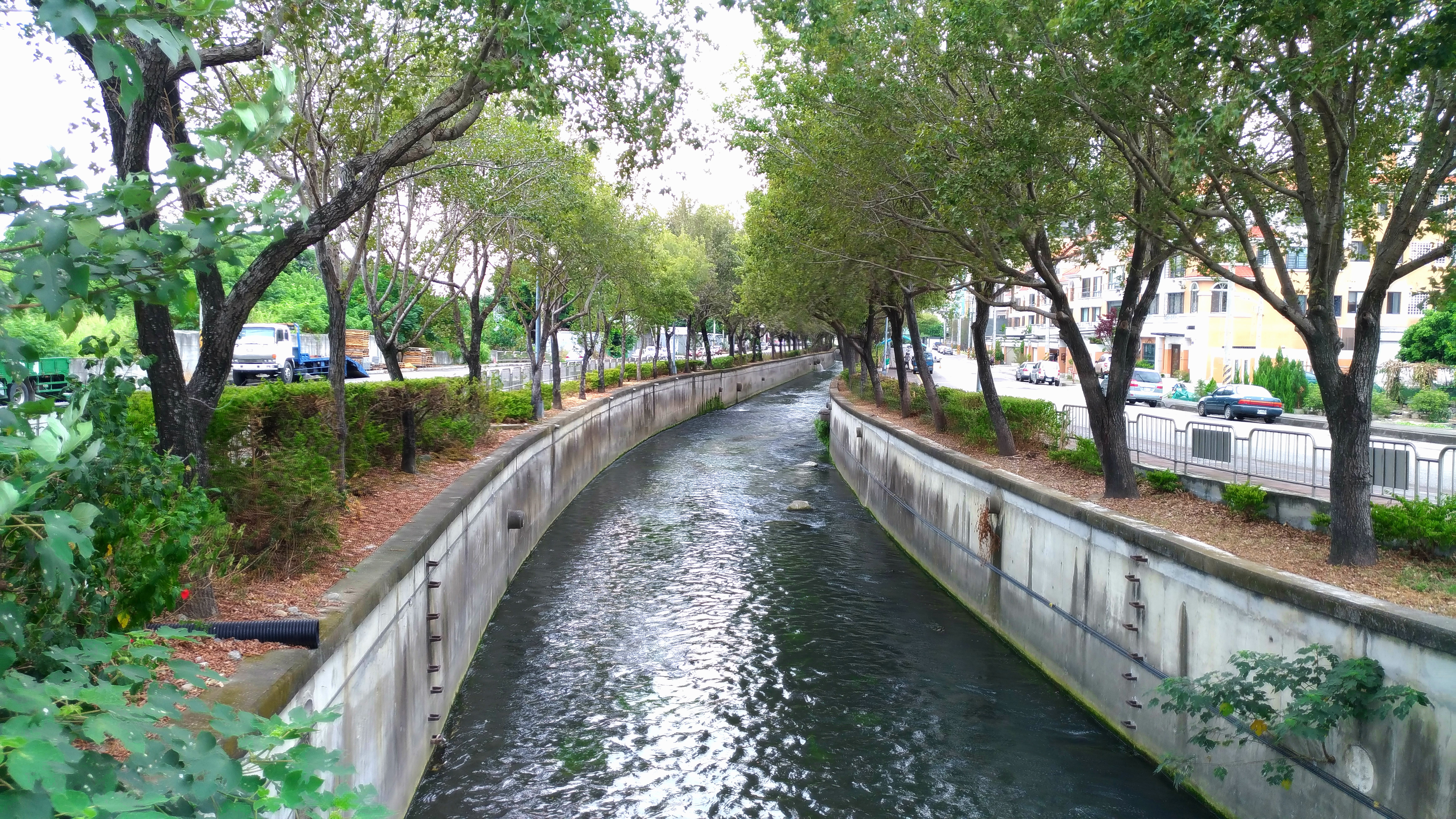 中文（台灣）: 台中楓樹社區前的楓樹腳溪